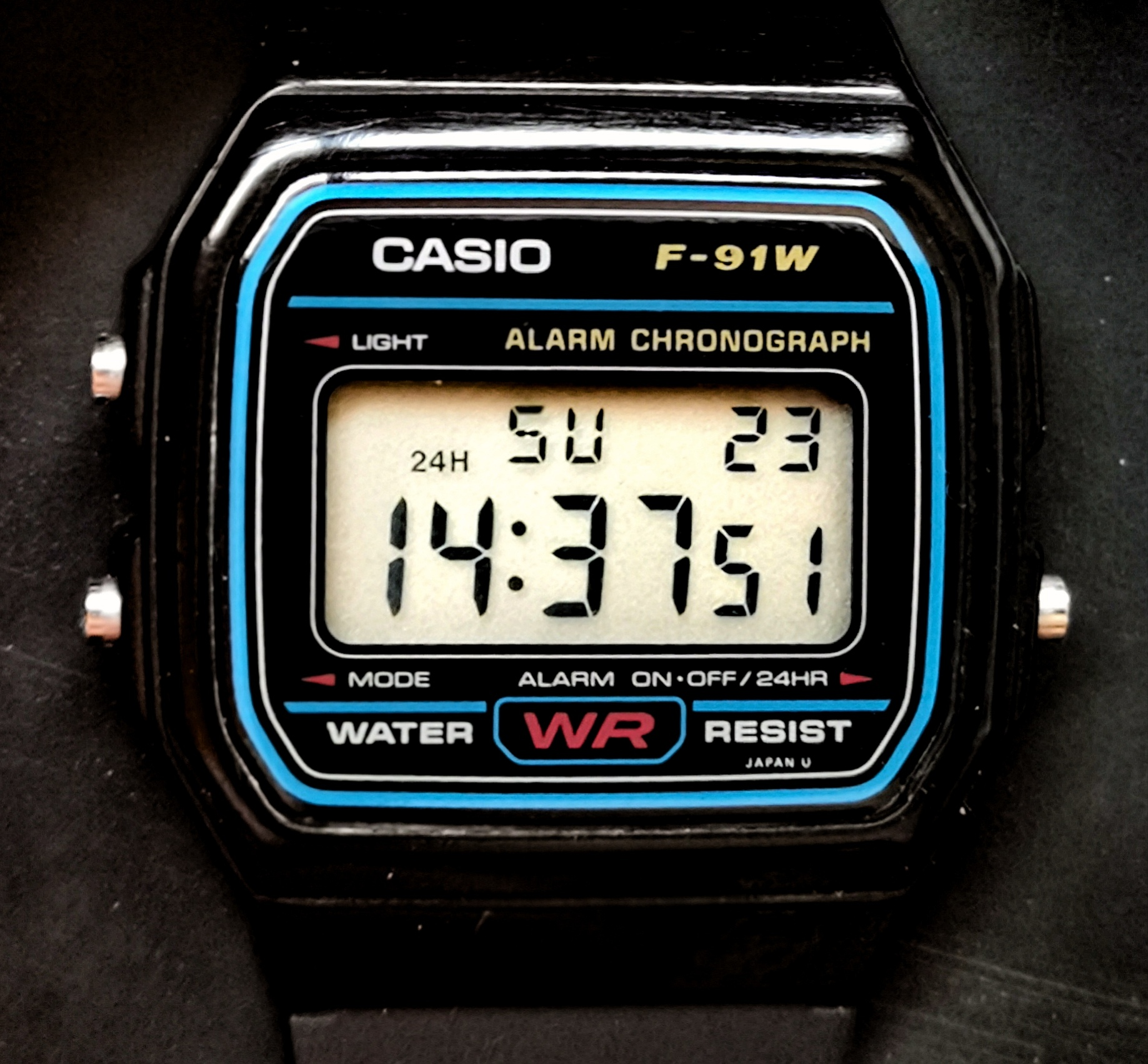 Casio F-91W fabricado en Japón a finales de los años 80. Se le puede observar la leyenda Japan U, debajo de la palabra Resist.